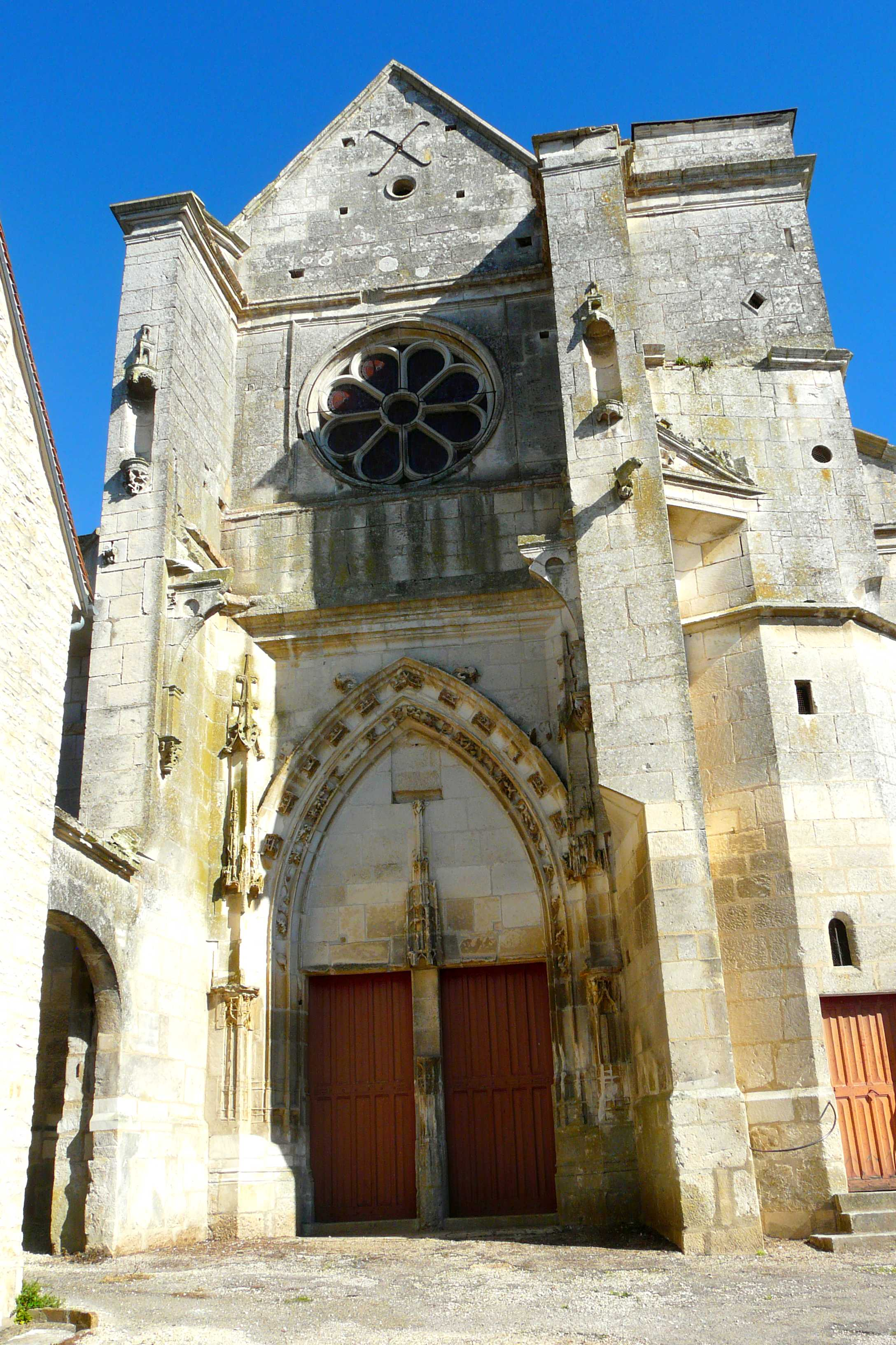 Église Saint-Aignan de Poilly-sur-Serein (Classé) .